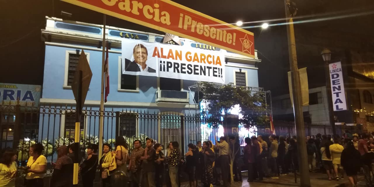 Funerales de Alan García - Foto 1